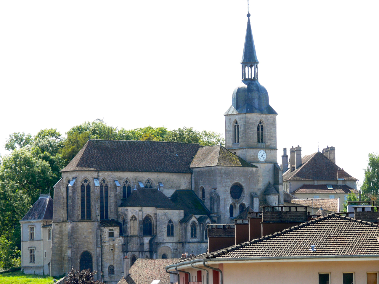 Église Saint-Nicolas de Neufchâteau, Lorraine, France Style roman et gothique, mise au tombeau Renaissance, autels XVIII°